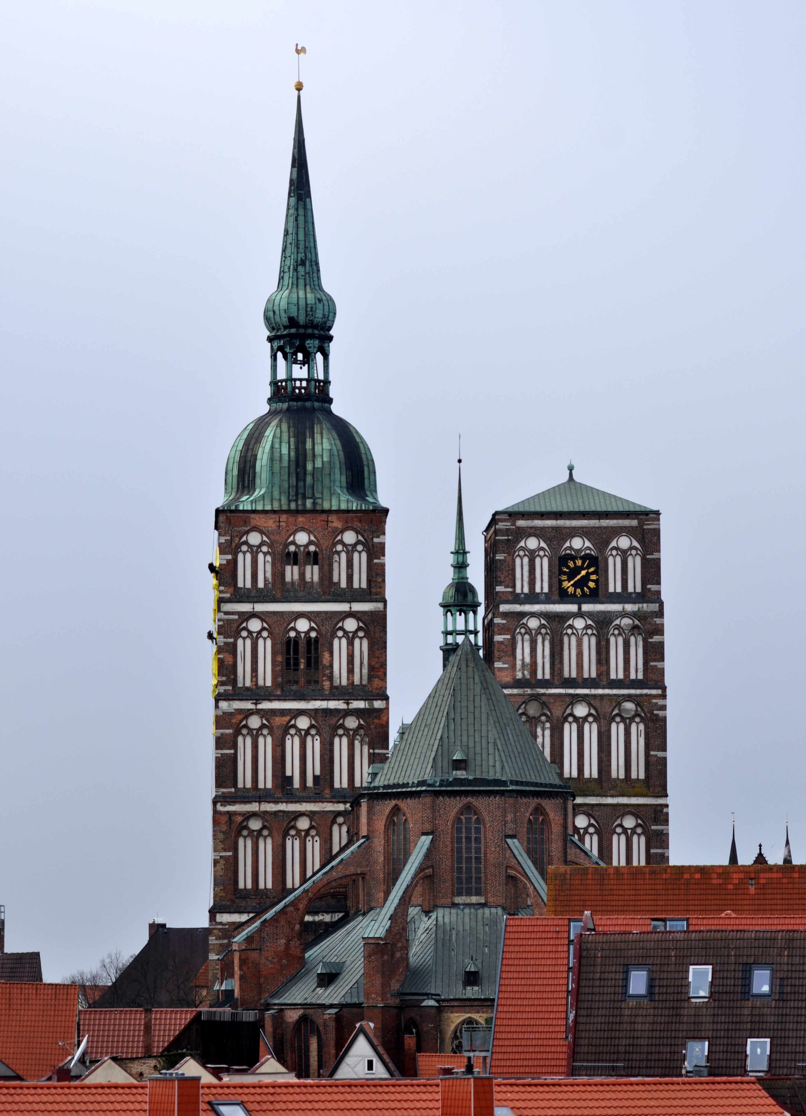 Die Nikolaikirche in Stralsund, vom Dach des Ozeaneums aus gesehen.